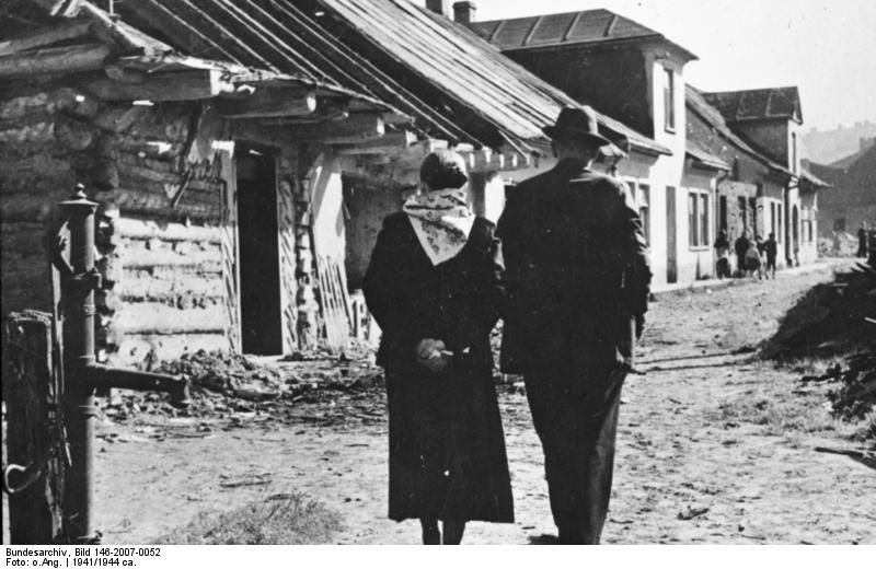 03 Aussenstrasse